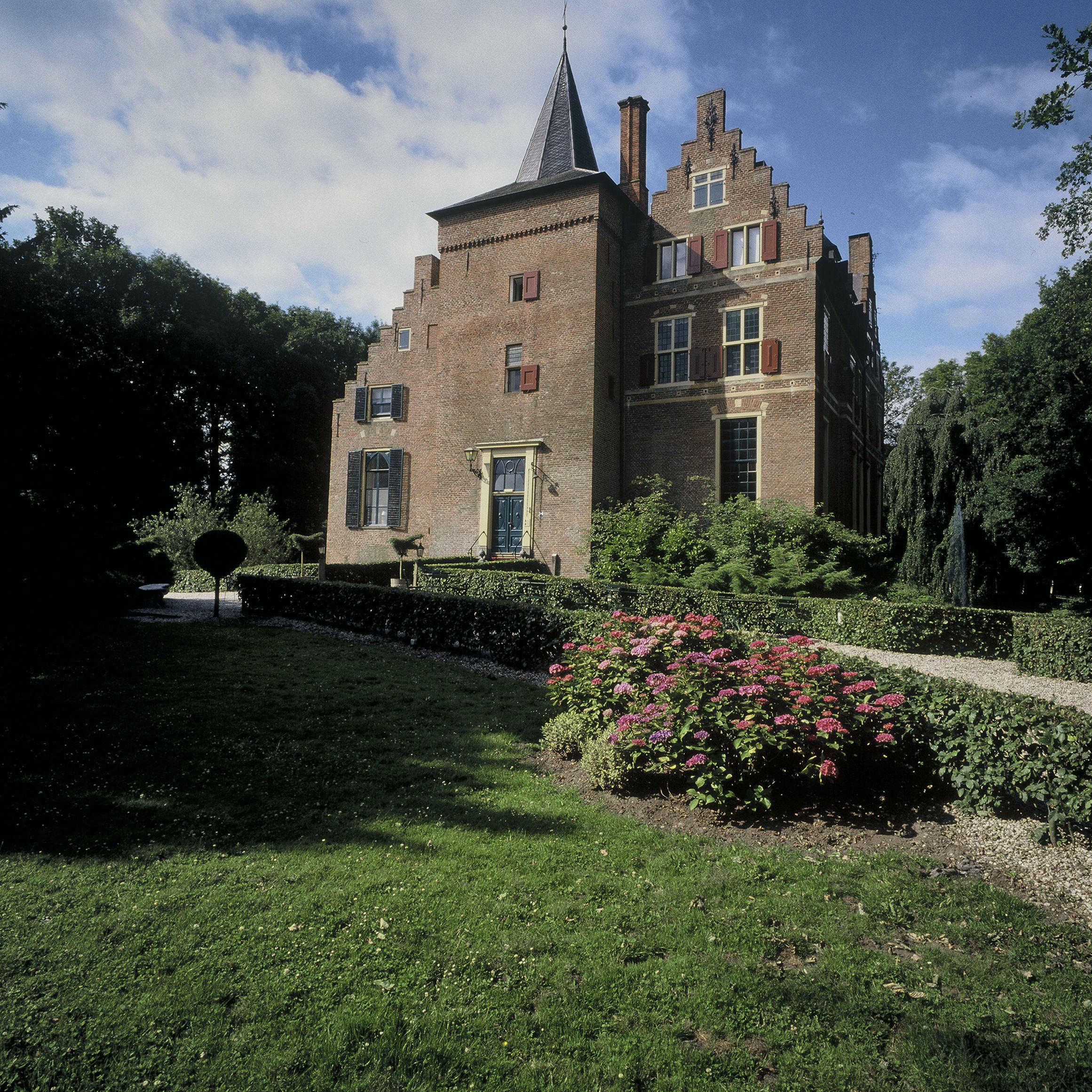 Kasteel de Wyenburg: Overzicht van de voorgevel, gezien vanuit het noorden (opmerking: Gefotografeerd voor het boek "Geldersche Kasteelen" door J.C. Bierens de Haan en J.R. Jas)